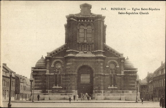 Carte postale de l'église du Saint-Sépulcre de Roubaix, vers 1930 (démolie en 1961).